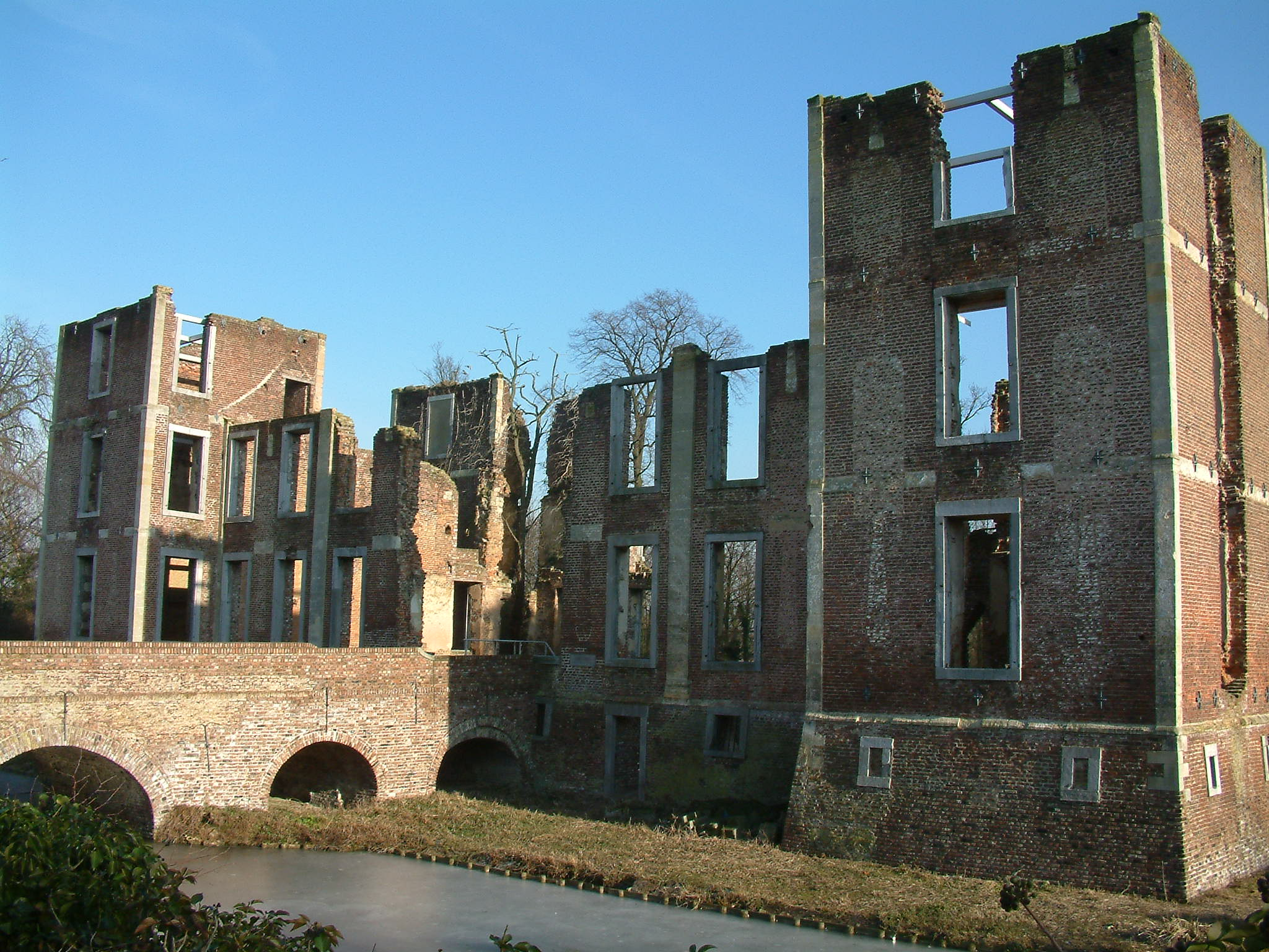 Kasteel Born, ruïne